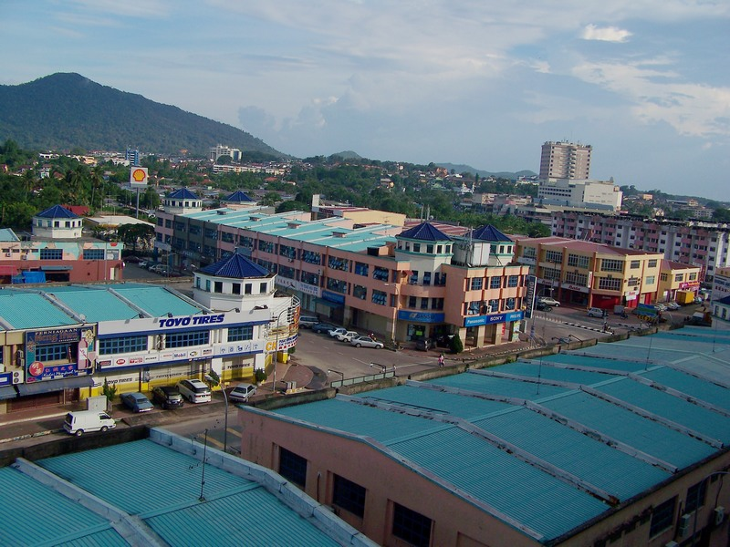 居銮01